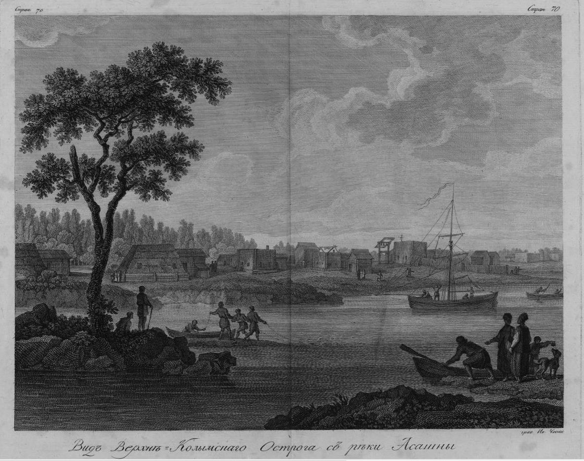 Вид Верхне-Колымского острога с реки Асашны; Гравировал Иван Ческий. Атлас карт и рисунков к путешествию в Северо - восточную часть России и на острова северной части Тихого океана флота капитана Г. Сарычева.1802.